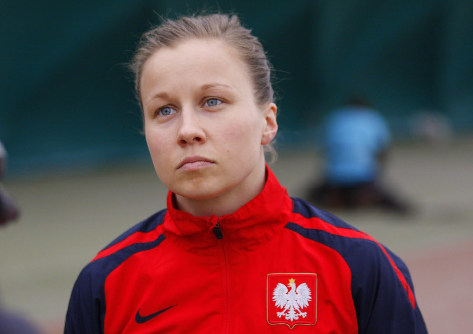 Agata Tarczyńska, polska piłkarka.